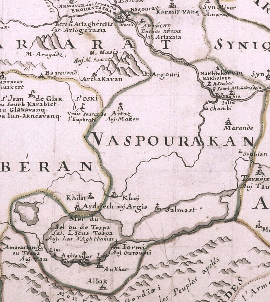 L'Arménie majeure dressée sur les auteurs arméniens et divisée en 16 grandes provinces.